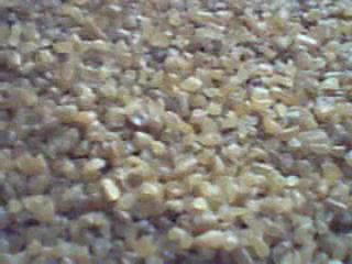 bulgur